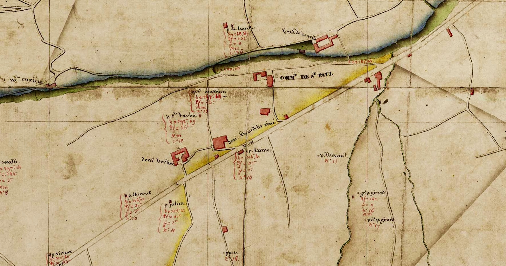 Saint-Paul-en-Jarez (Loire), extrait de l'Atlas Beaunier 1813. "L’atlas Reconnaissance du territoire houiller de l'arrondissement de Saint-Étienne. Département de la Loire. Atlas. 1813" est plus connu sous le nom d’Atlas ou plans Beaunier. Il représente le tracé des affleurements des couches de houille ainsi que l’emplacement des mines abandonnées et celles en activités en 1813 dans le bassin de Saint-Etienne et Rive-de-Gier.